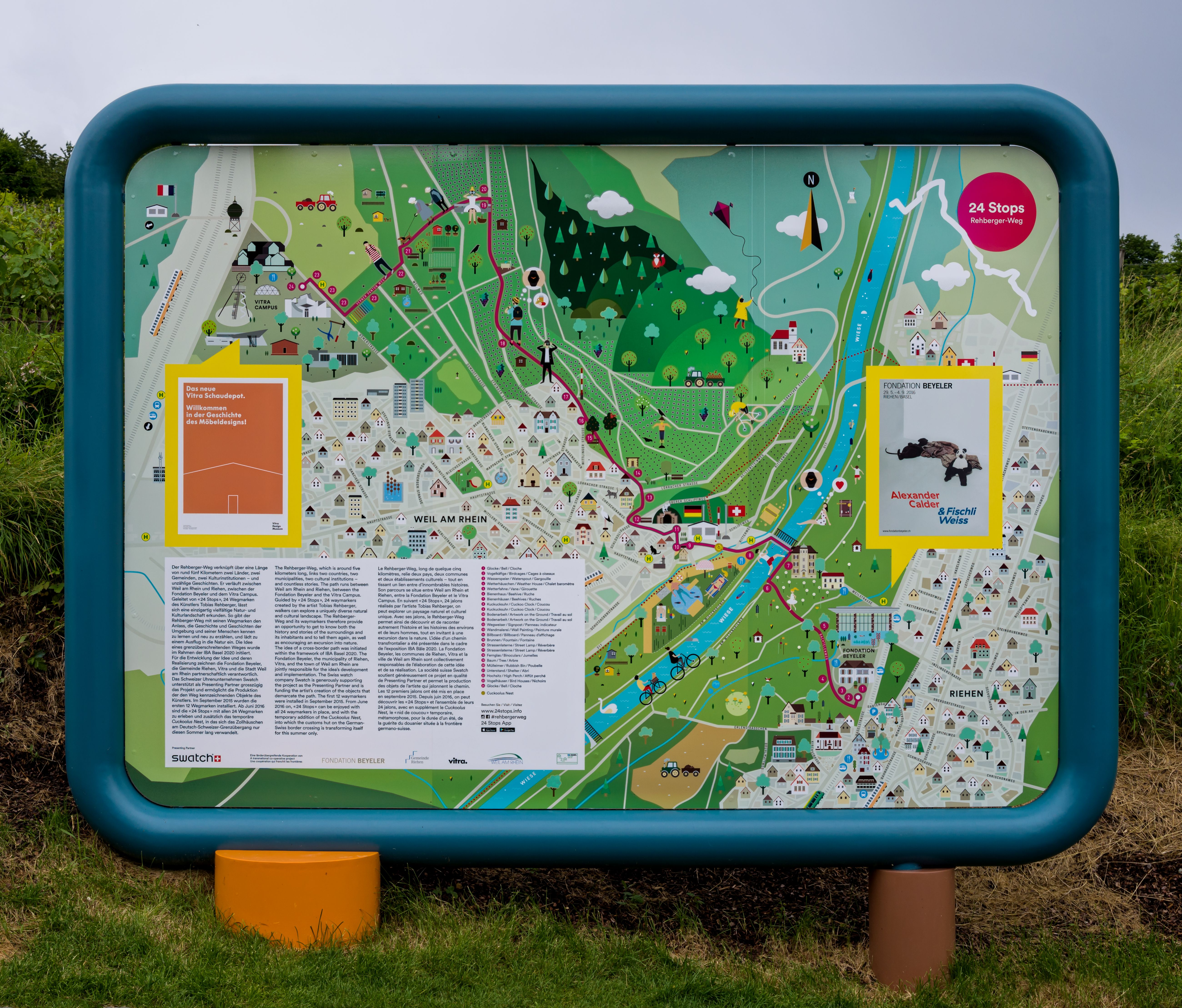 Der neue Wanderweg "24 Stops" von der Fondation Beyeler zum Vitra Campus sind von Tobias Rehberger gestaltet, die Nummerierung beginnt bei 1 in der Fondation Beyeler